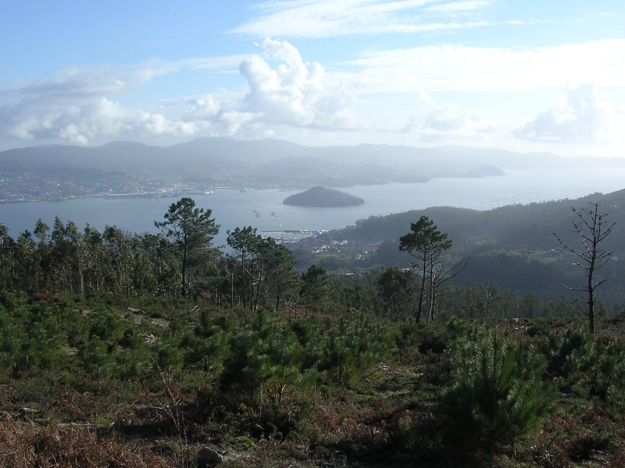 Monte Castrove